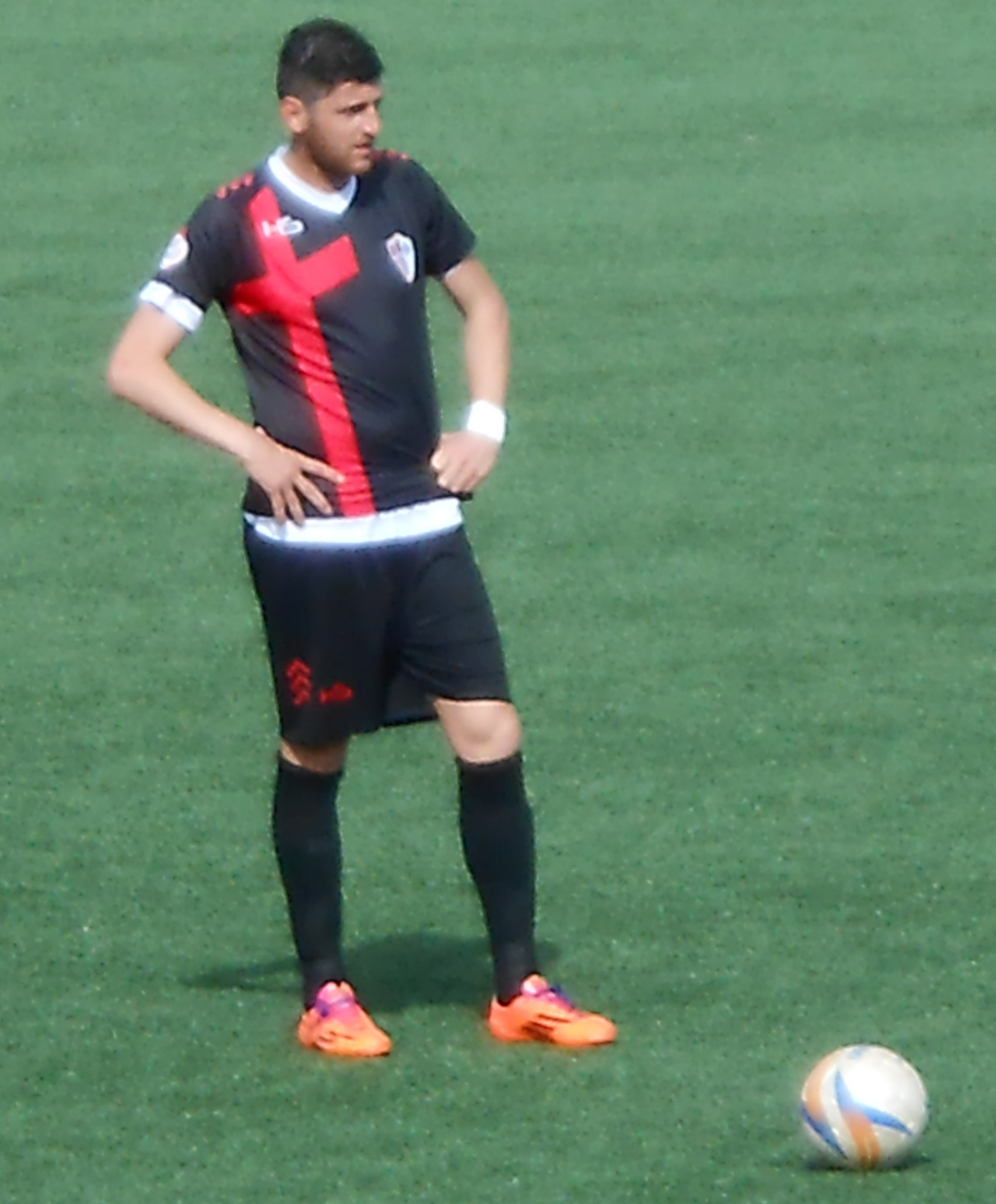 Mariano Stendardo durante Savoia - Matera